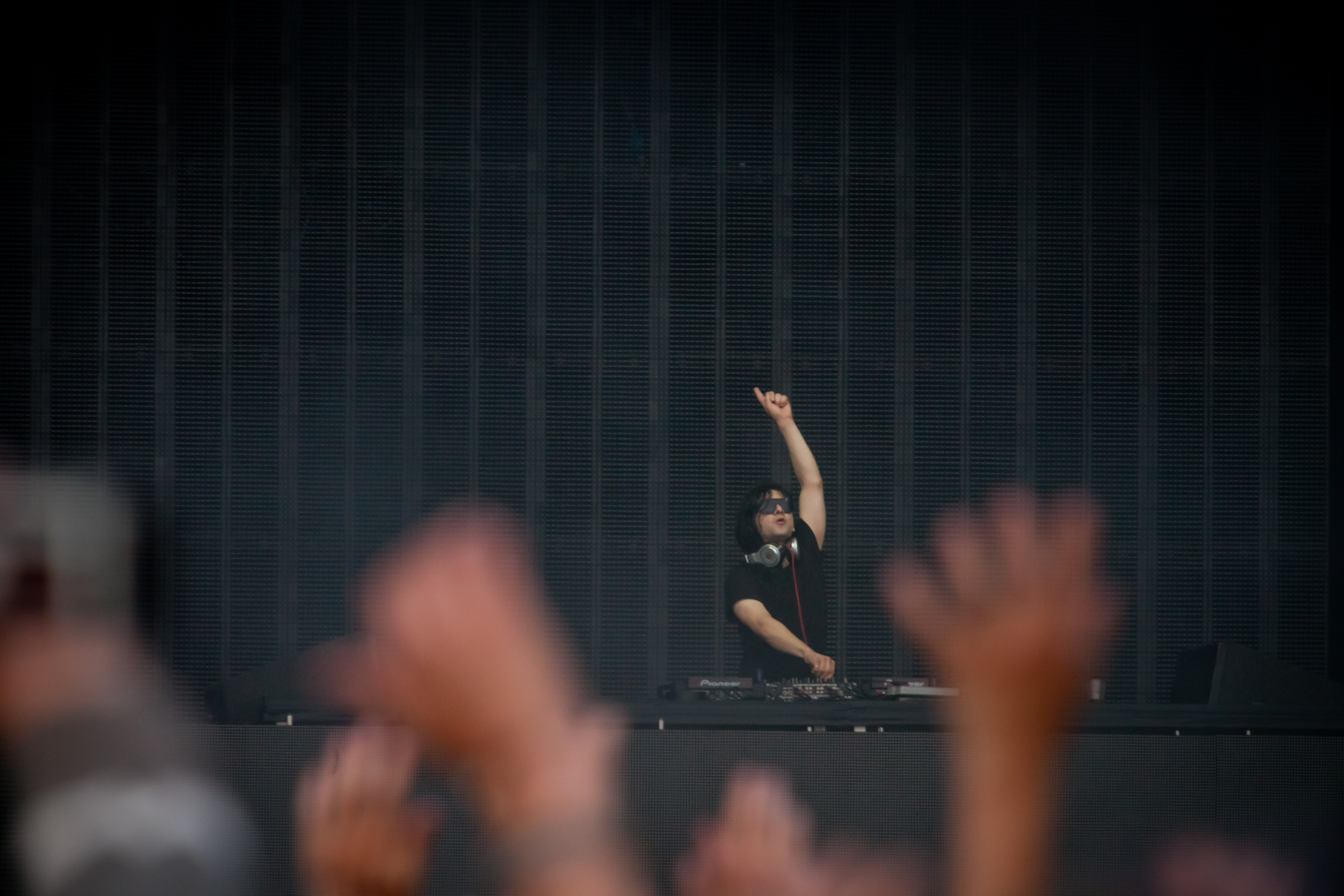 Sonny Moore, Skrillex